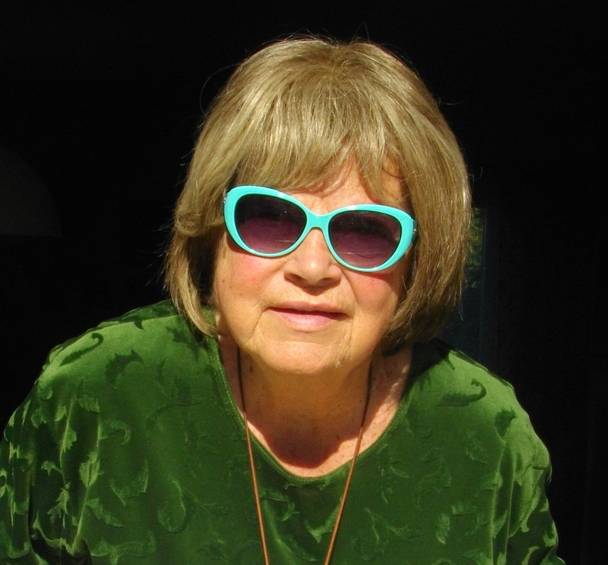 Margarete Schilling (* 1932), Glocken-Expertin und Autorin (Apolda), Foto aus dem Jahr 2020